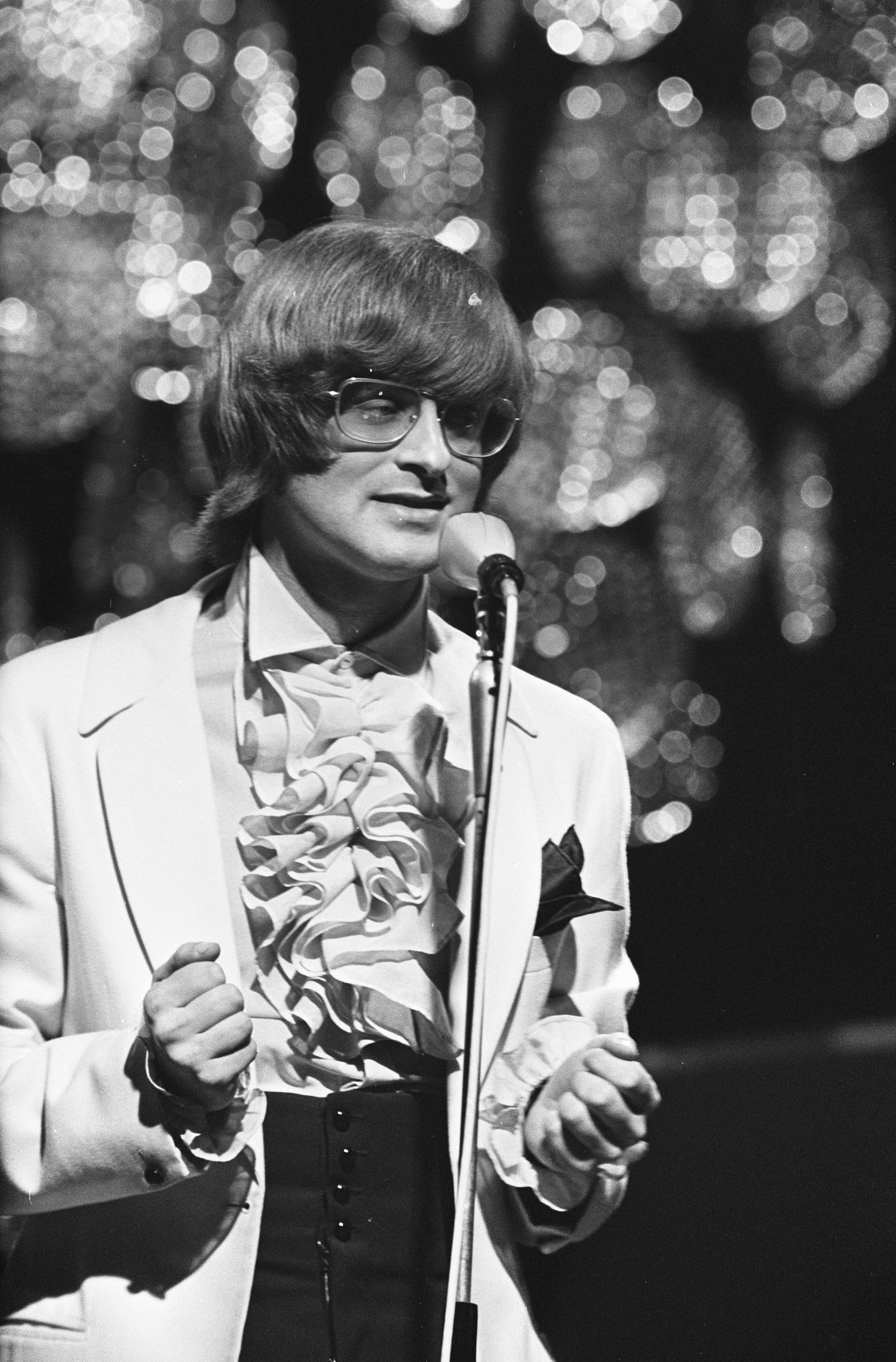 Collectie / Archief : Fotocollectie Anefo Reportage / Serie : [ onbekend ] Beschrijving : Nationale finale van het Eurovisie Songfestival in Scheveningen nr. 17 : Dave Datum : 26 februari 1969 Locatie : Scheveningen, Zuid-Holland Trefwoorden : SONGFESTIVALS, finales Fotograaf : Koch, Eric / Anefo Auteursrechthebbende : Nationaal Archief Materiaalsoort : Negatief (zwart/wit) Nummer archiefinventaris : bekijk toegang 2.24.01.05 Bestanddeelnummer : 922-1434